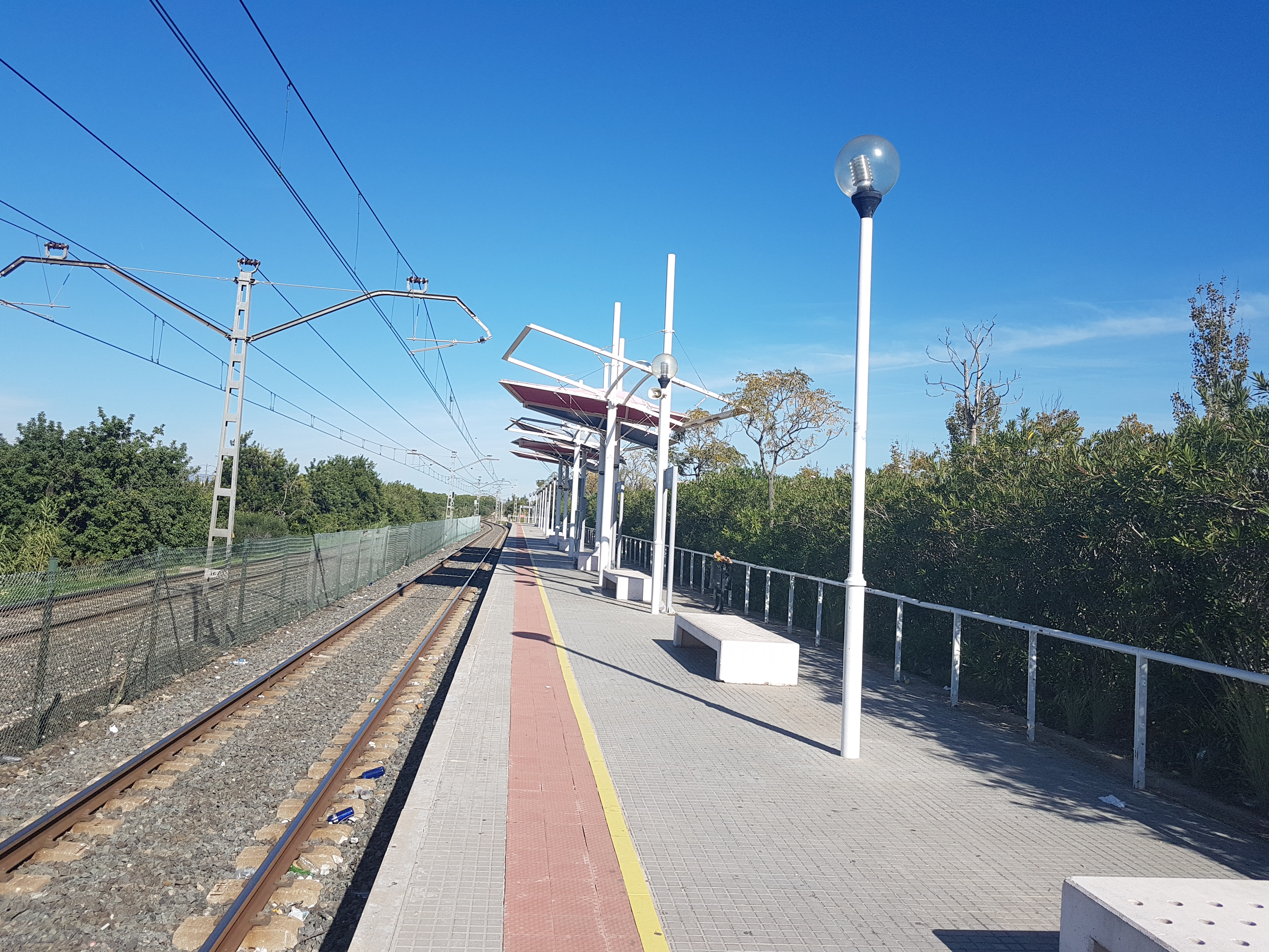 Estació de tren de Port Aventura de la línia Tarragona-Tortosa